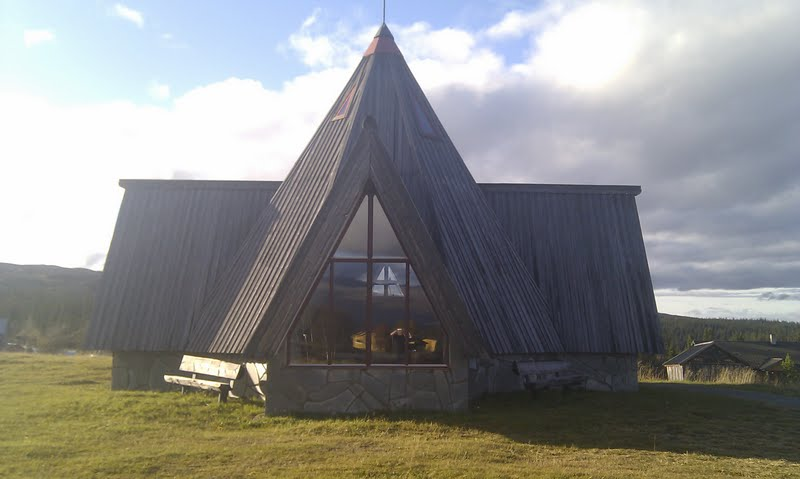 Storvallen kapell